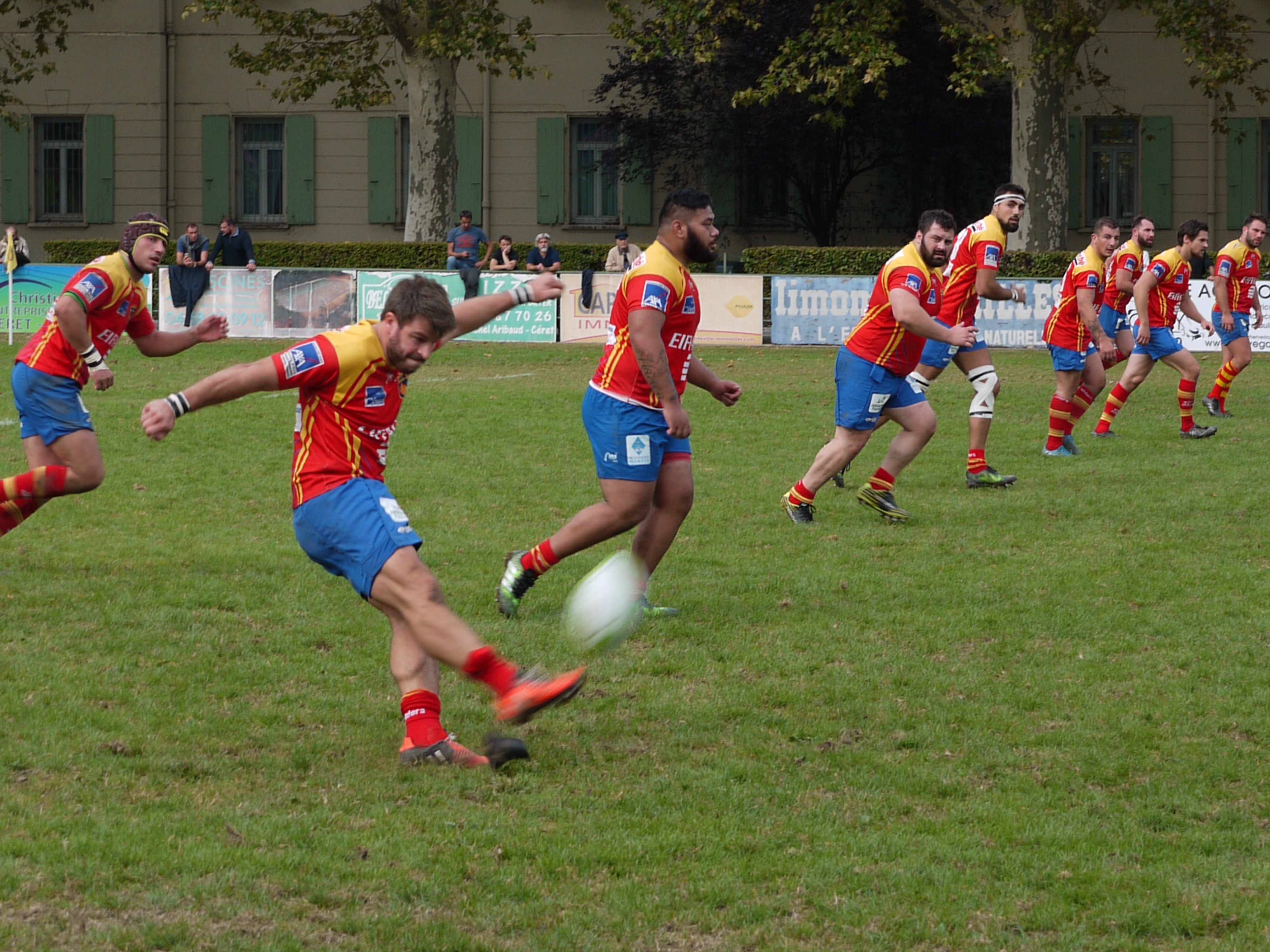 Match Céret sportif vs RO Grasse à Céret le 17 septembre 2017 (au ballon n°11 Matthieu Bourret)